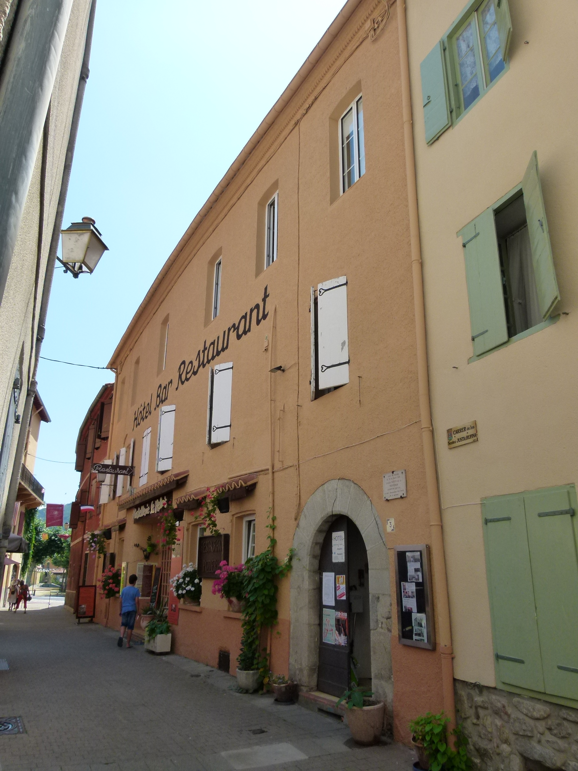 Casa on va néixer l'escriptor Carles Bosch de la Trinxeria